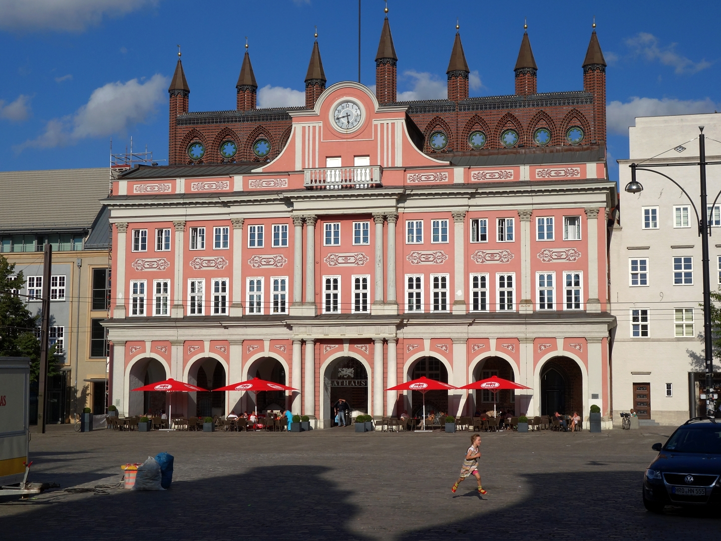 Das Rostocker Rathaus am Neuen Markt